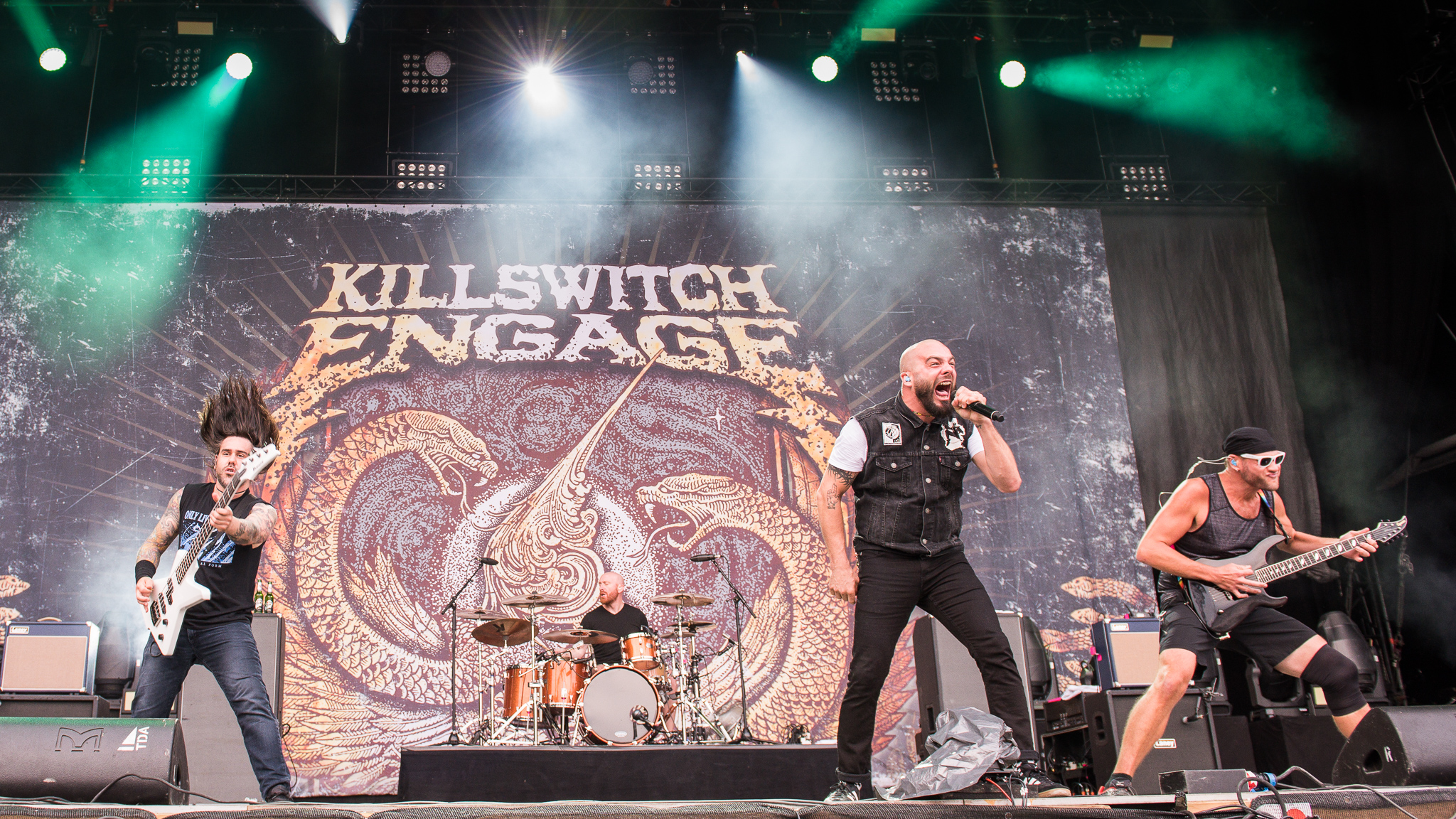 ARGO-Konzerte,Adam Dutkiewicz,Beck's Park Stage,Festival,Jesse Leach,Justin Foley,Killswitch Engage,Konzert,Livekonzert,Livemusik,Mike D’Antonio,Musik,RiP,Rock im Park 2016